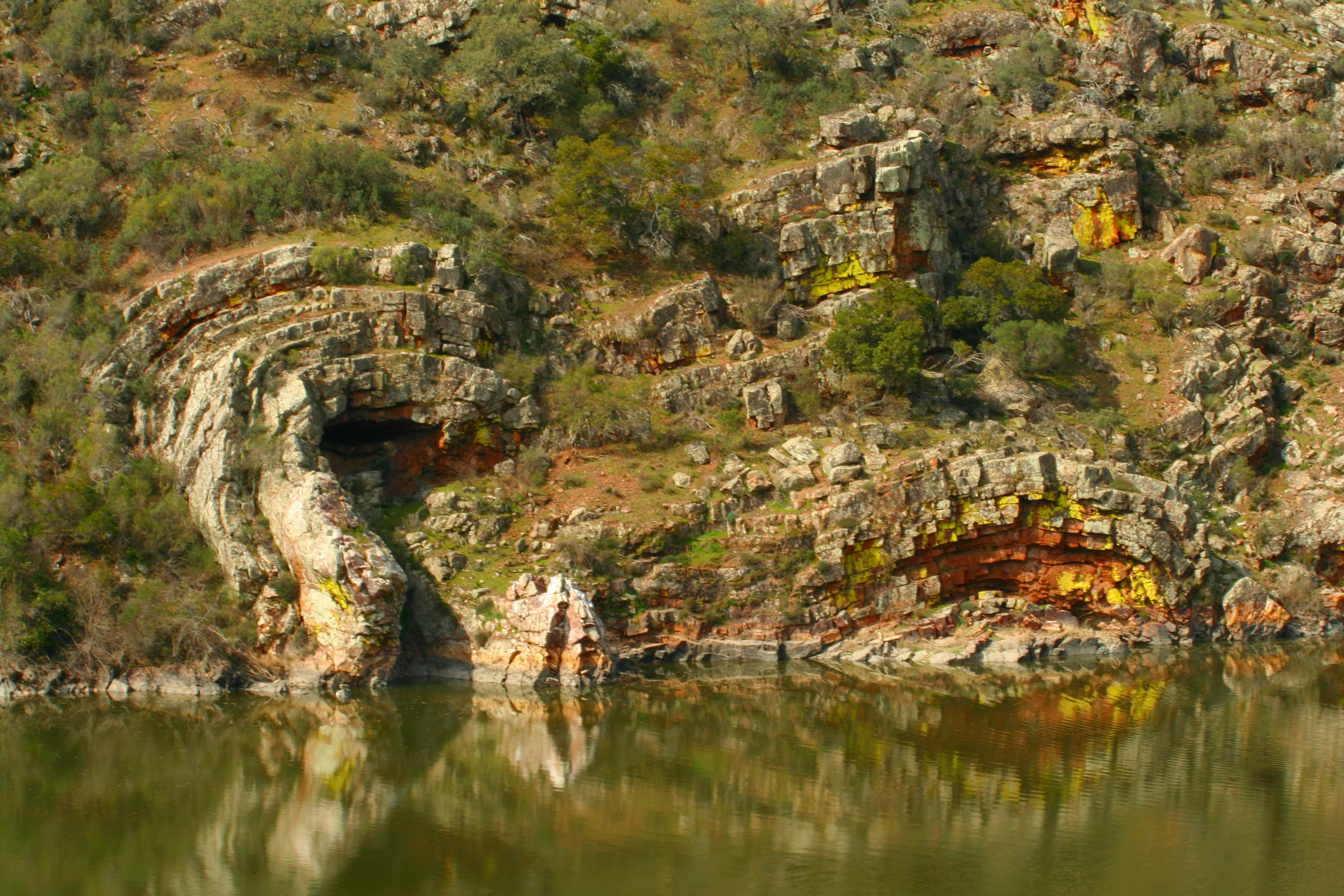 Deformaciones estratigráficas en el Parque Nacional de Monfragüe, Cáceres (Extremadura, España). Formación Cuarcita armoricana (cf. Biodiversidad Virtual) del Ordovícico.